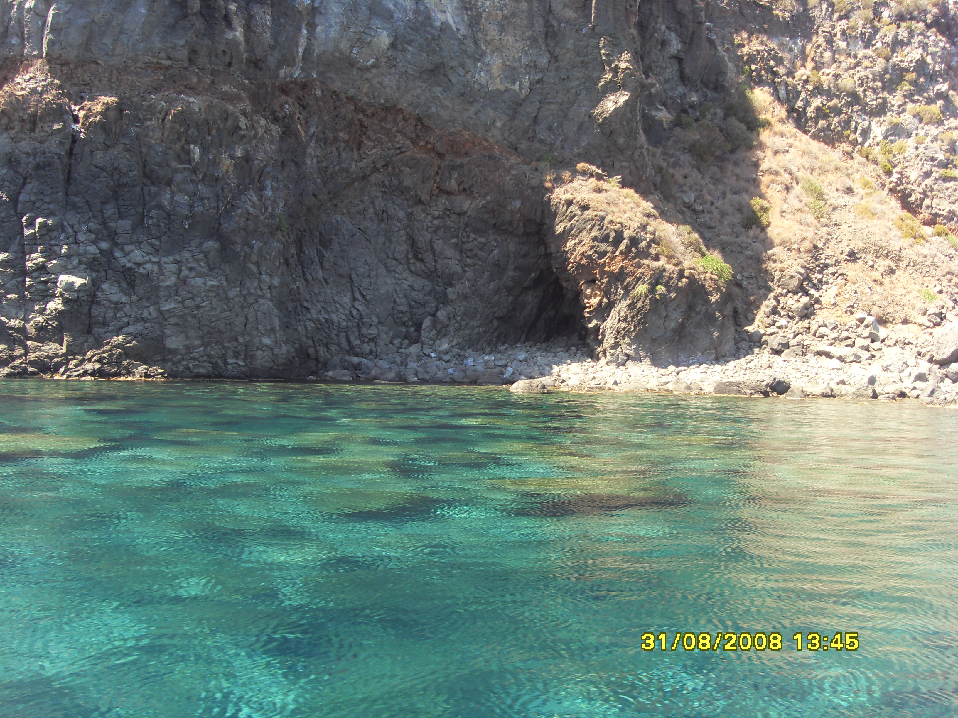 Questo file raffigura la costa pantesca (TP).